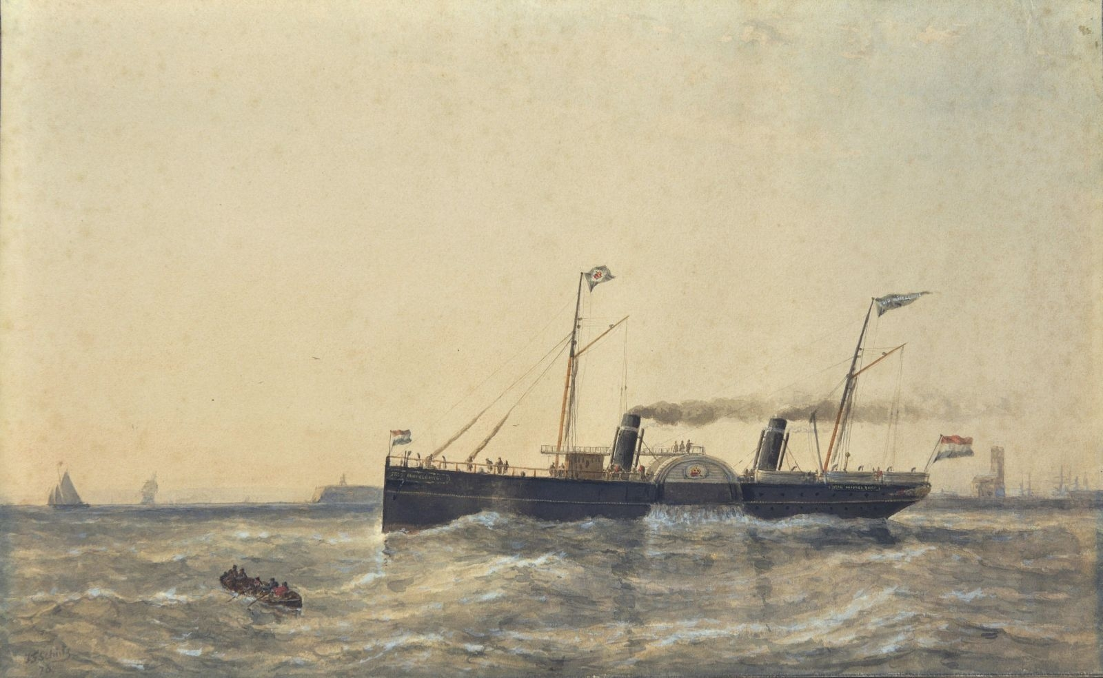 Op de voor- en achterzijde alsmede op de puntvlag staat de naam van het schip "Stad Middelburg", het logo (rood/gouden kroon) van de SMZ op een andere vlag en op het schoepenrad, een sloep/roeiboot met 5 personen, gebouwen langs de kade, links het Keizersbolwerk en rechts het meteorologisch observatorium van de KNMI voltooid in 1873, en silhouetten van driemasters in de buitenhaven. Links op de voorgrond loodswerry.